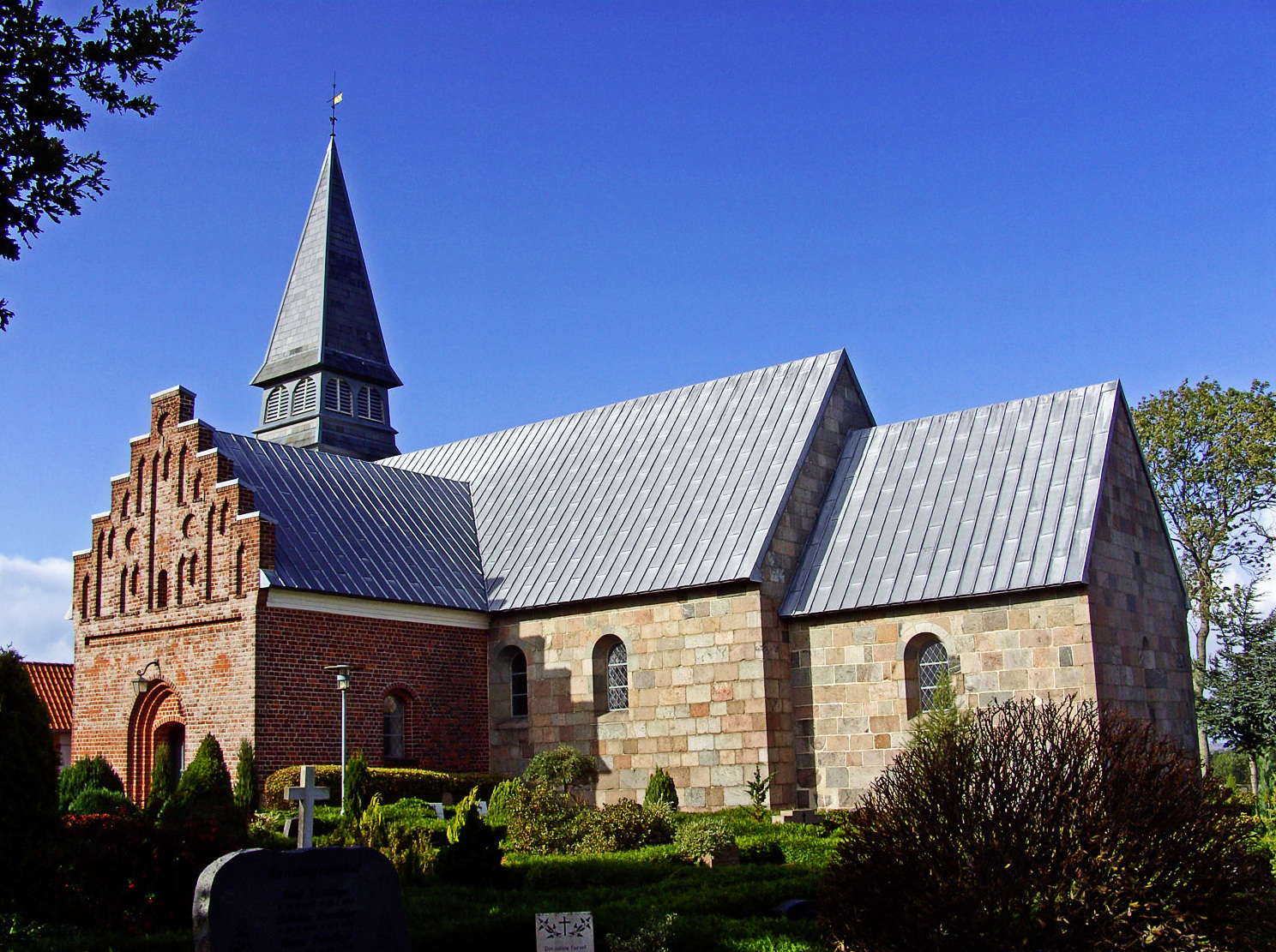 fra sydøst